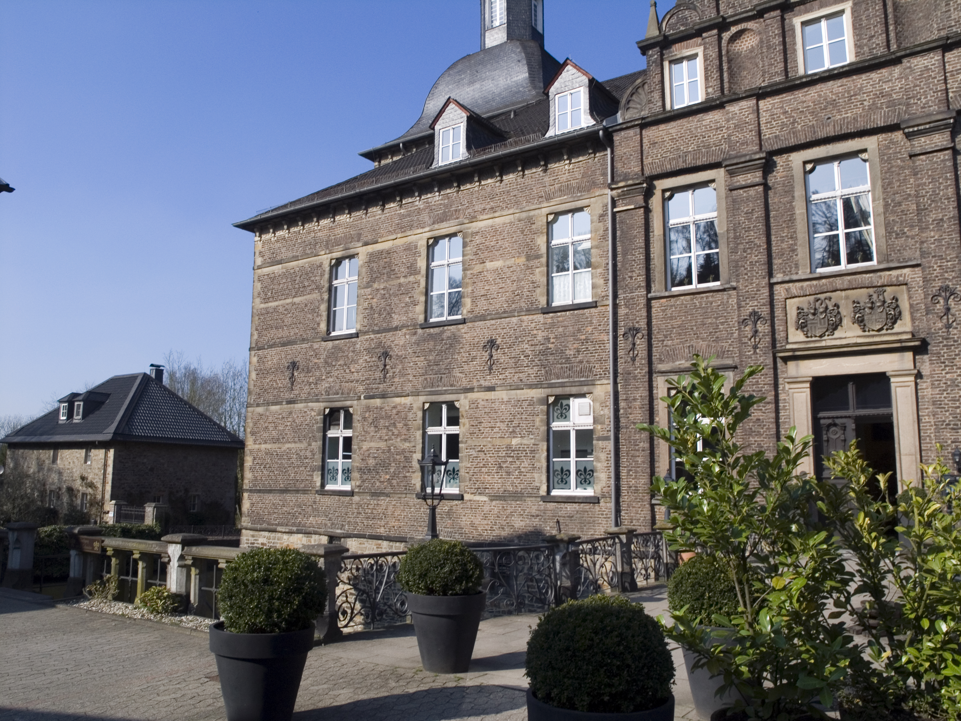 Северный Рейн - Вестфалия, Эссен, Кеттвиг - замок Гугенпот (господский дом)